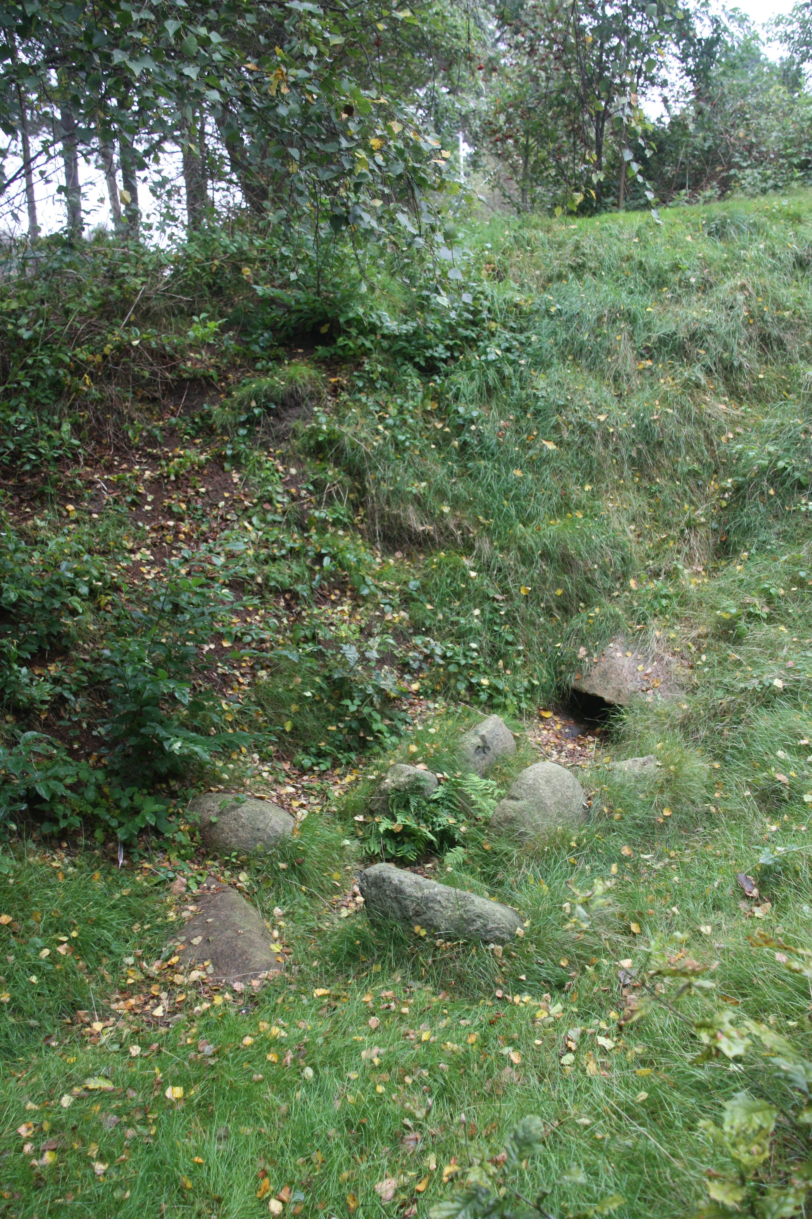 Hügelgrab in Steenodde, Ual Hööw, Blick in die Reste der Kammer